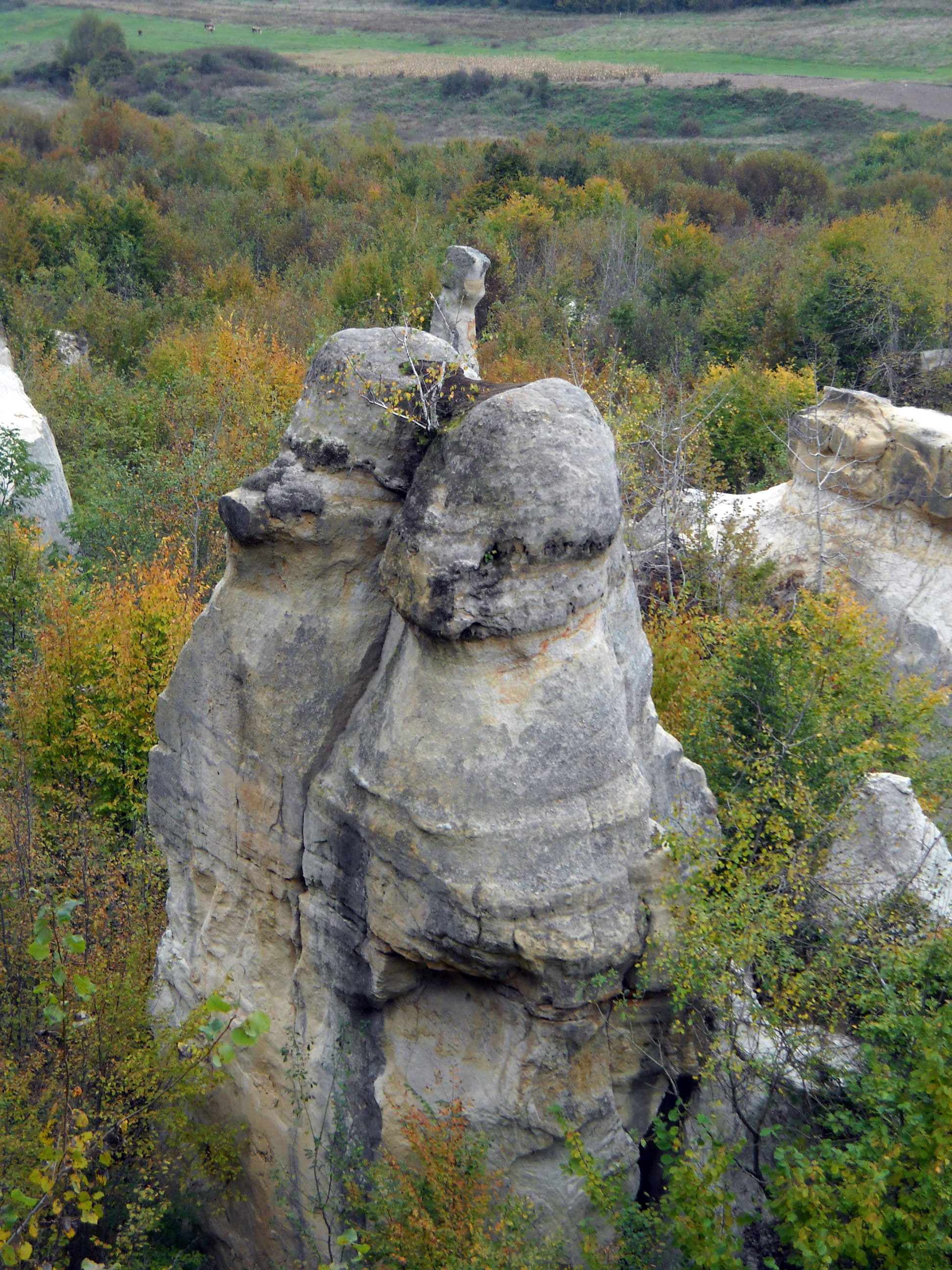 Sárkányok kertje, Almásgalgó, Szilágy megye, Románia